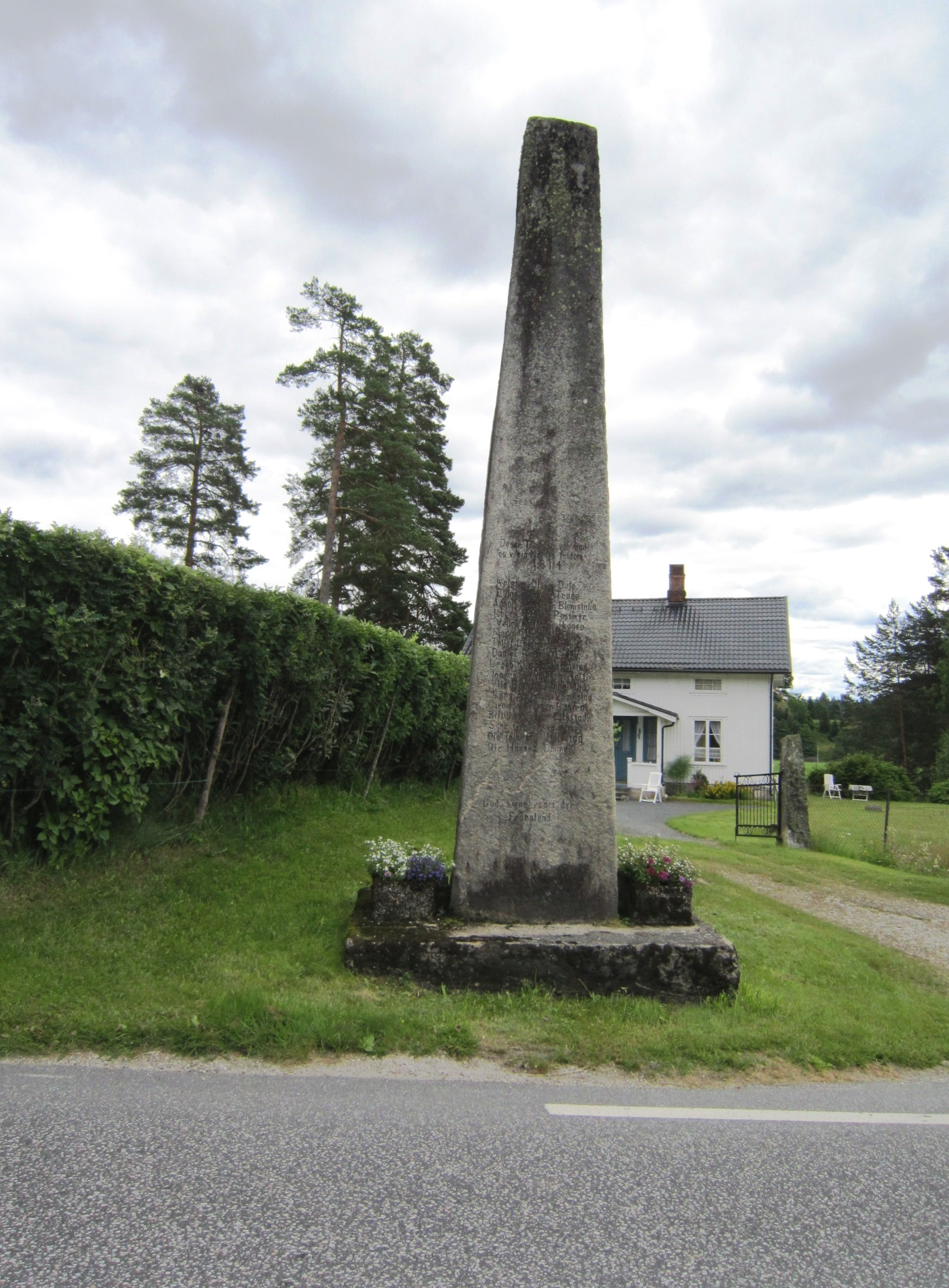 Krigsminnesmerke ved fylkesvei 38 i Bø i Tørdal (Drangedal kommune)